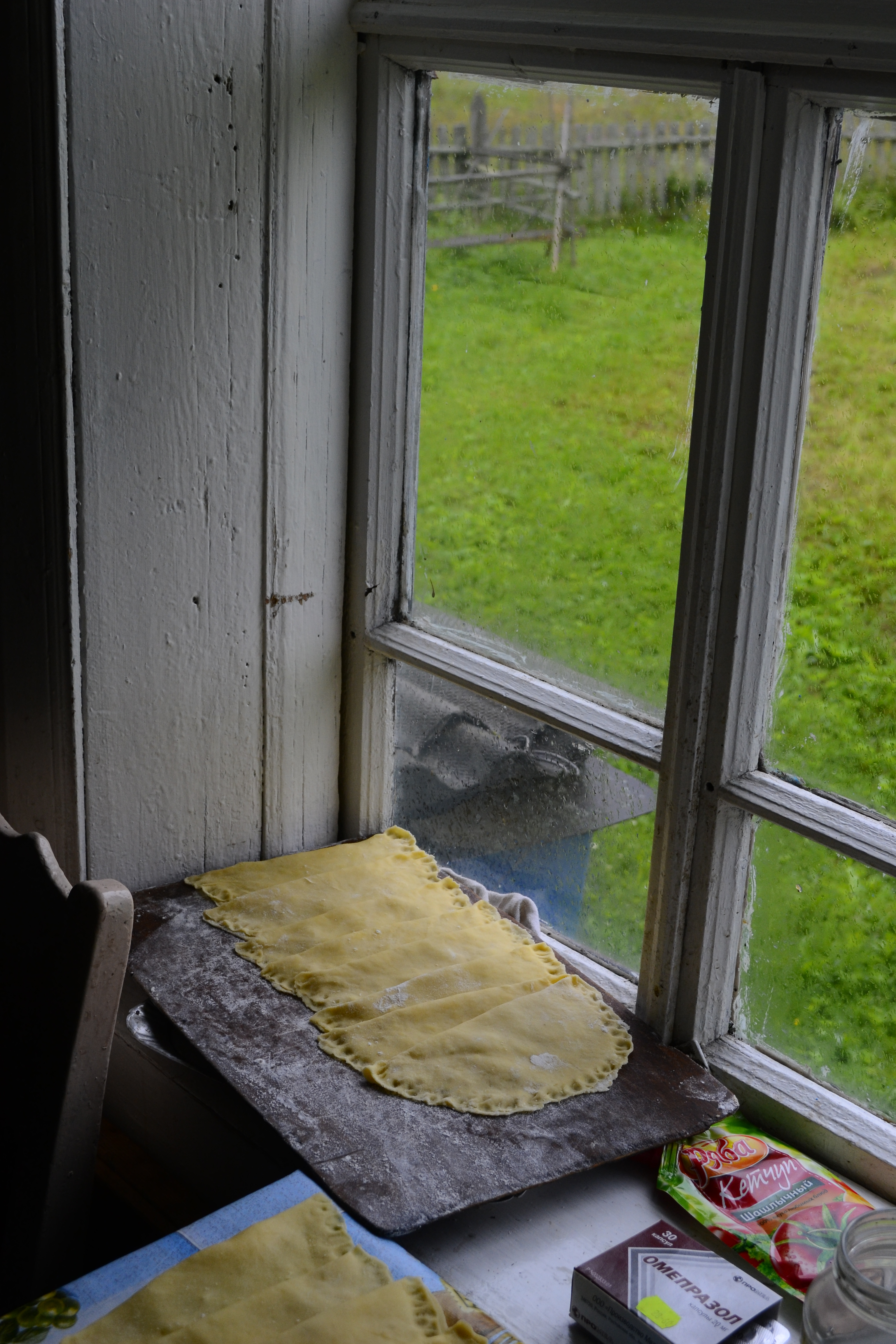 Vepsa pirukad, mis veel ootavad küpsetamist